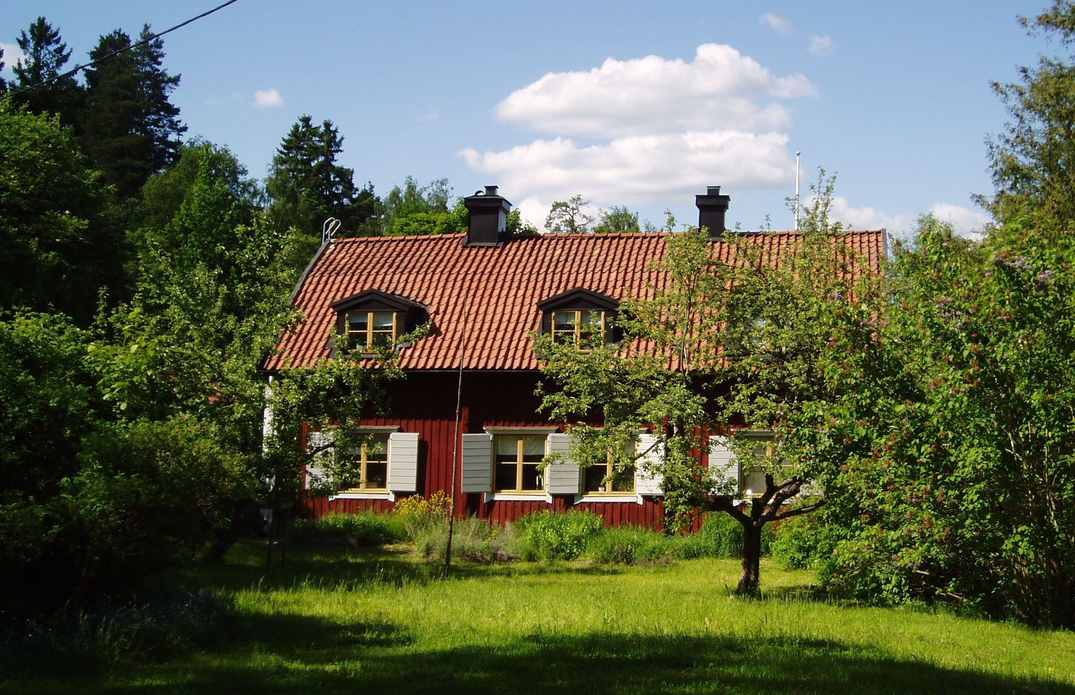 Klasroskolan, Sollentuna kommun, idag bostad och museum.